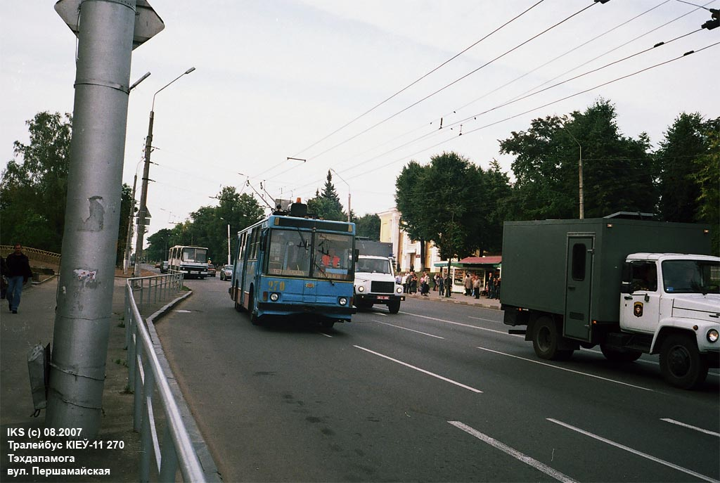 Троллейбус КИЕВ-11 в Могилёве